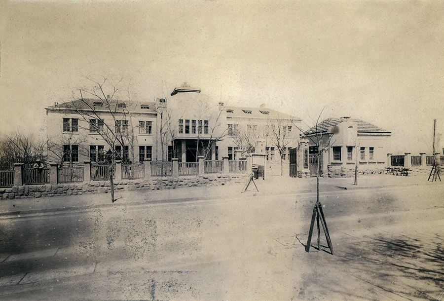 青岛普济医院